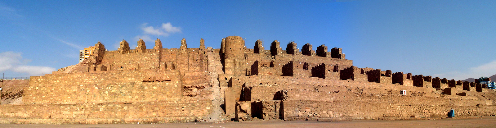 Ruinas de la Fundición de Metales de Huanchaca.